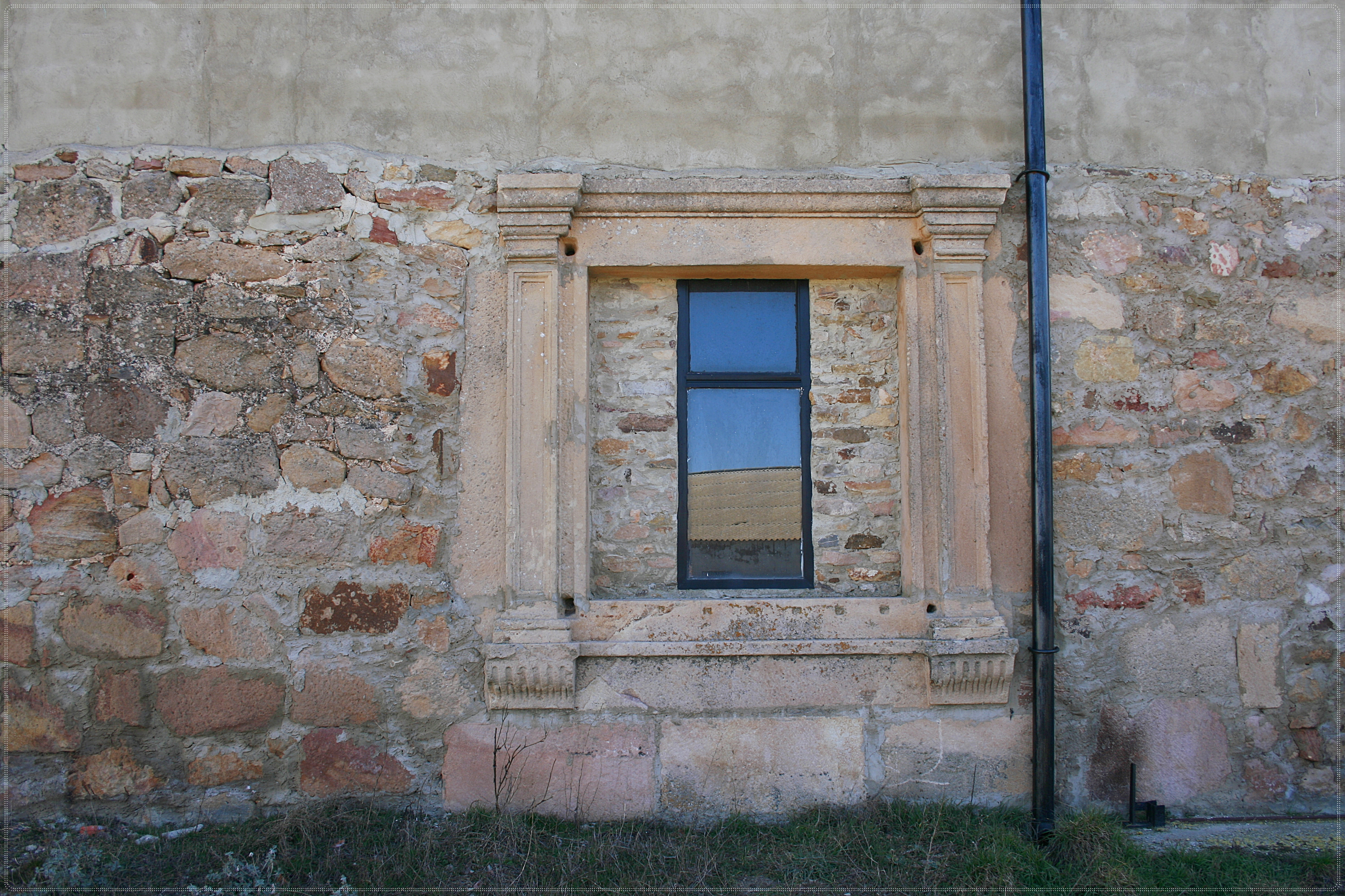 Una curiosa forma de cuidar nuestro patrimonio.La ventana esta en una nave agrícola.